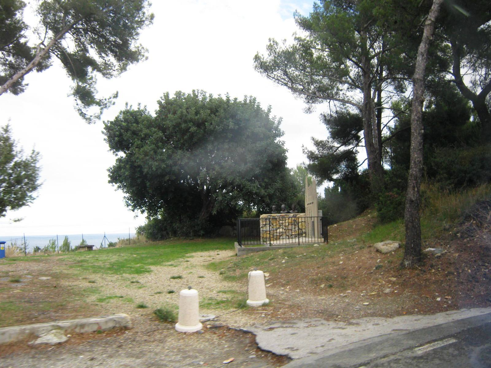 Gedenkteken Wielerronde Milaan-San Remo van 3 beroemde Italiaanse wielrenners.